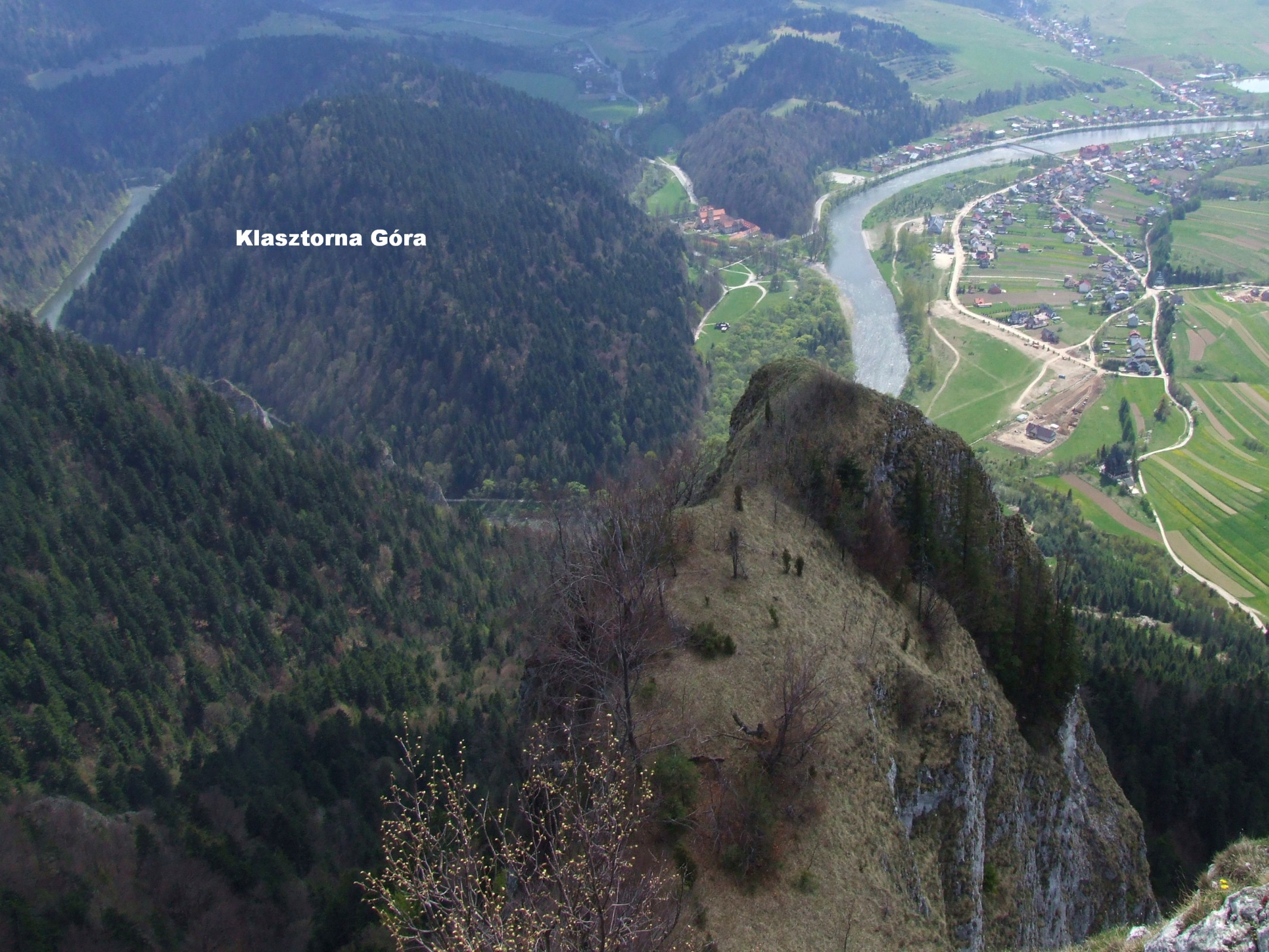 Klasztorna Góra, Sromowce Wyżnie, Czerwony Klasztor. Widok z Trzech Koron